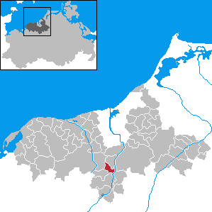 Benitz in Mecklenburg-Western Pomerania - District Bad Doberan